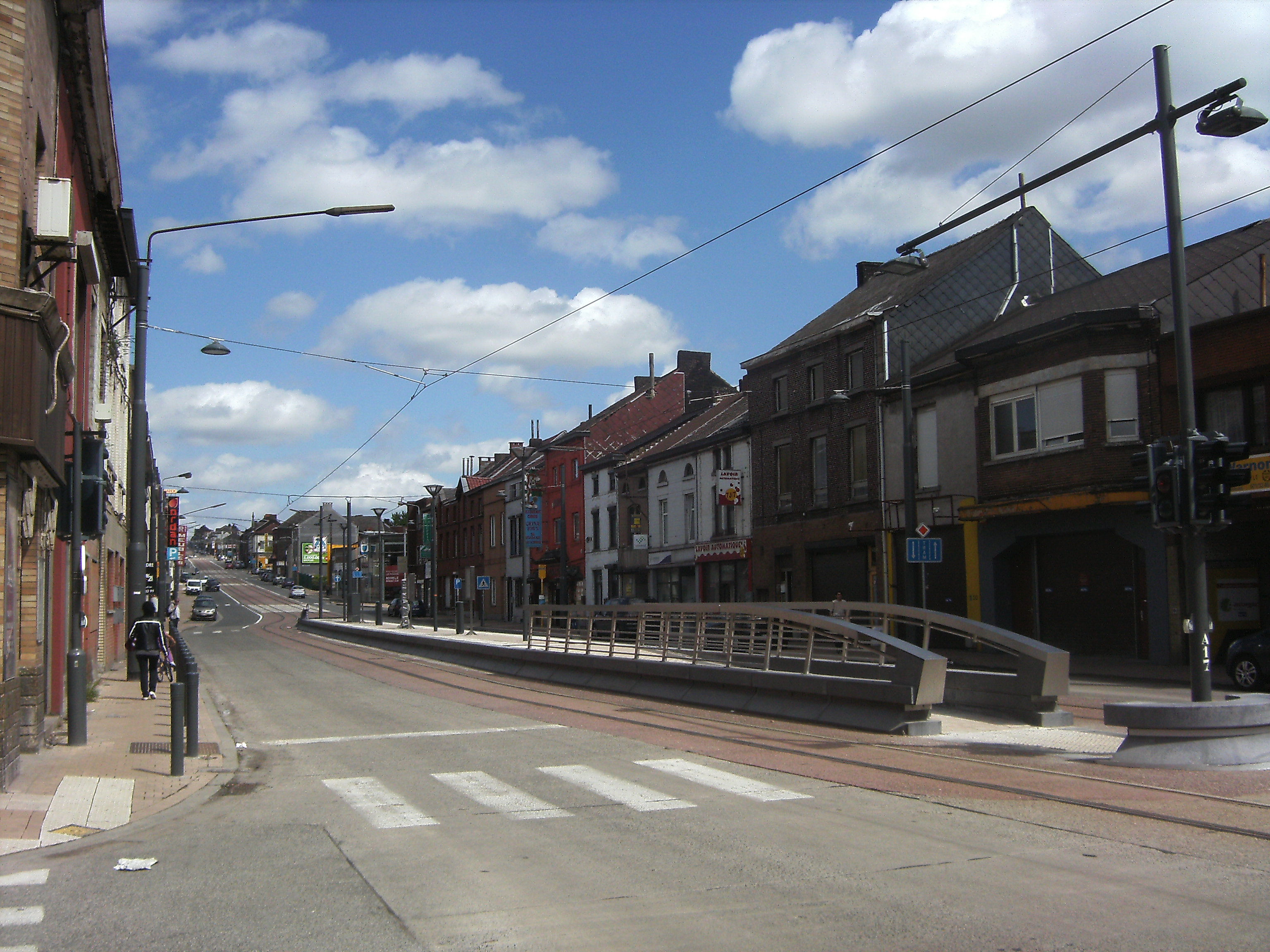 La Planche metro Station (Charleroi)